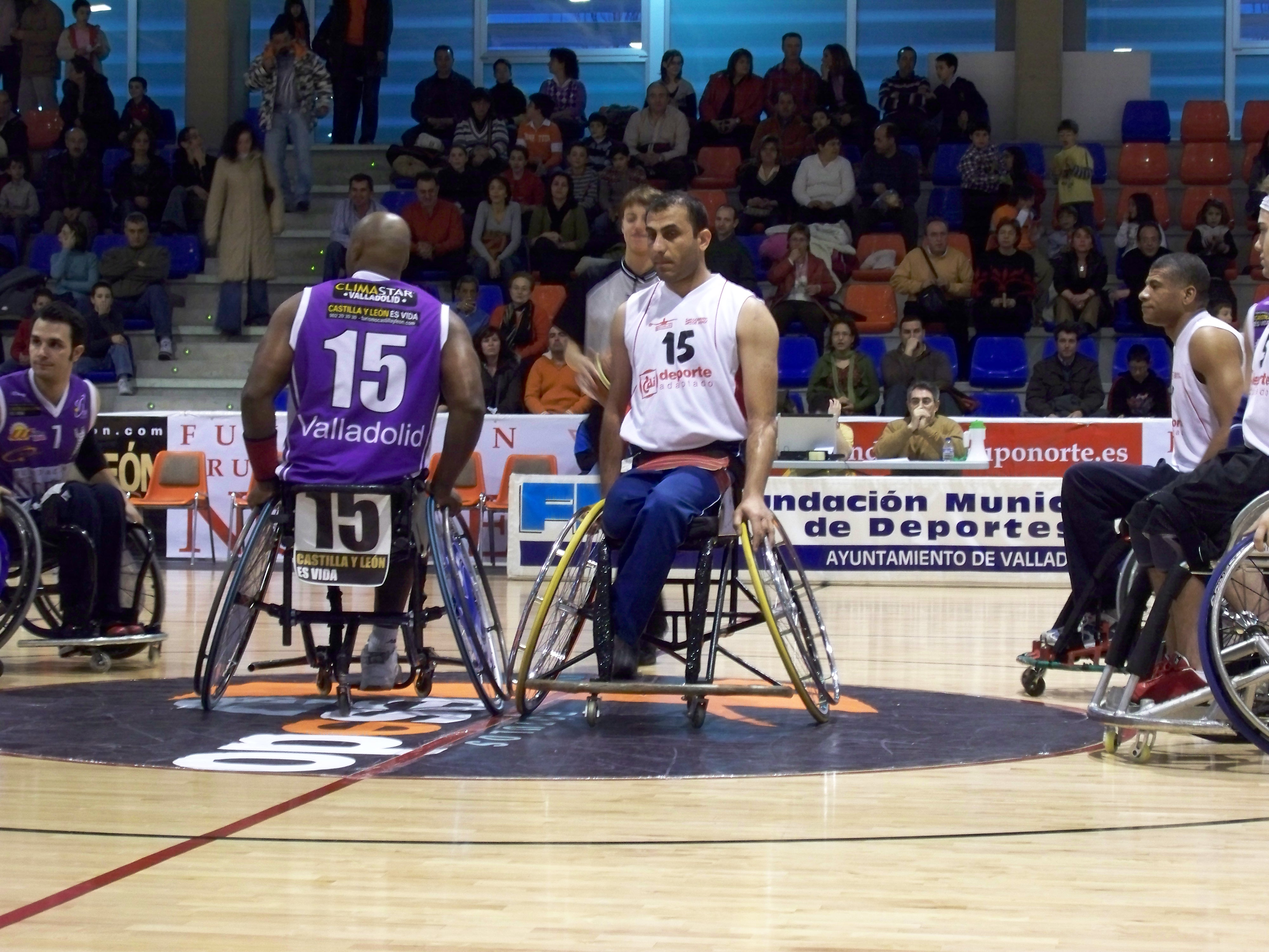 Inicio de un partido de baloncesto silla de ruedas.